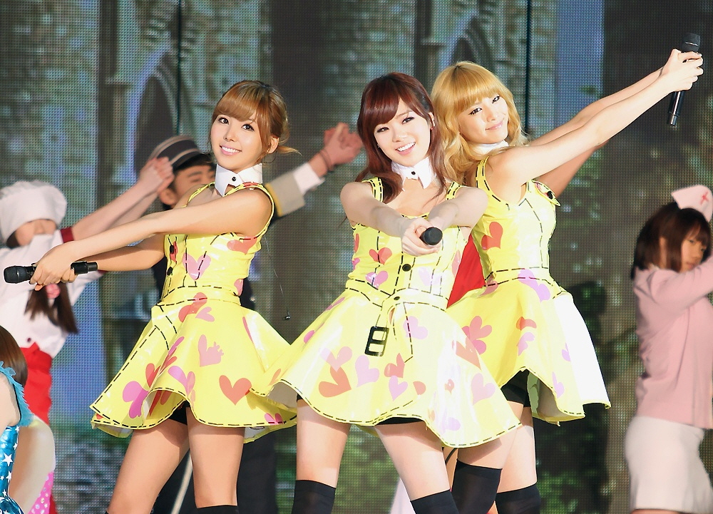 101229 sbs가요대전-오렌지카라멜